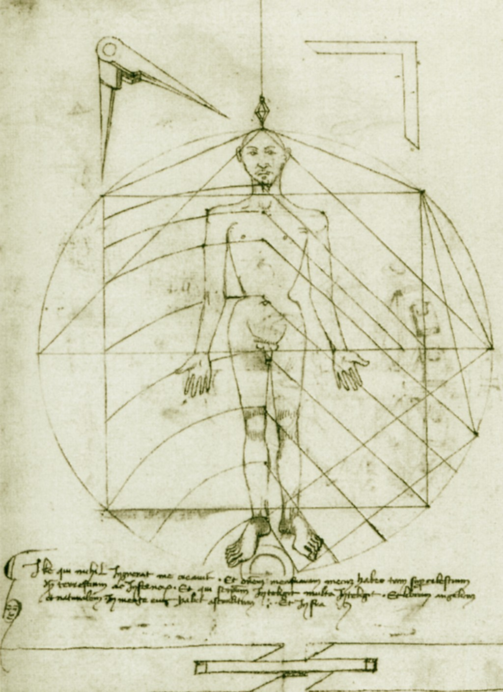 Mariano di Jacopo detto il Taccola, Proporzioni del corpo umano Vitruvian man. Instituto e Museo di Storia della Scienza, Florence, Italy